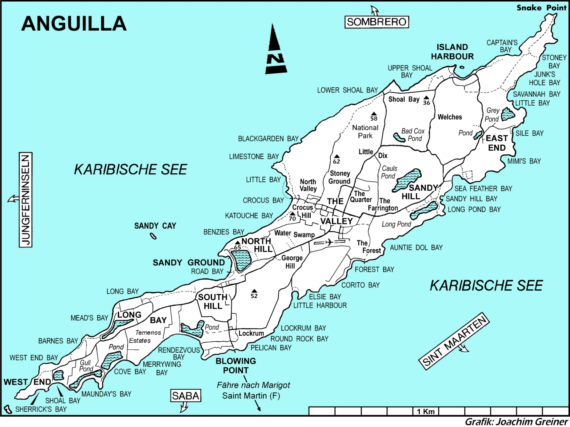 Karte von Anguilla